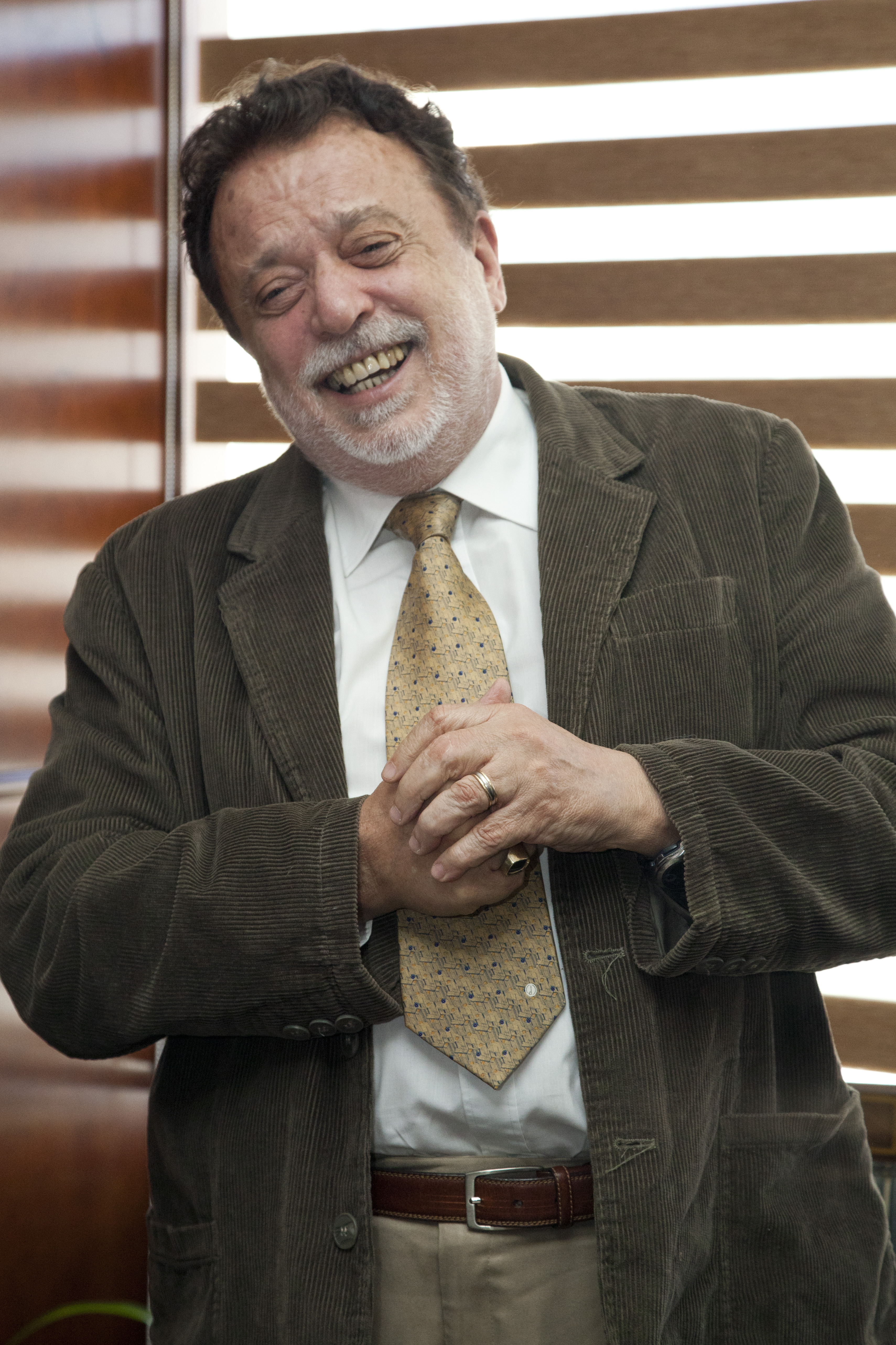 Quito (Ecuador), 30 de Mayo 2012. El Canciller Ricardo Patiño se reunión esta mañana en su despacho con el científico social y escritor Theotonio dos Santos. Foto: Fernanda LeMarie - Ministerio de Relaciones Exteriores, Comercio e Integración.